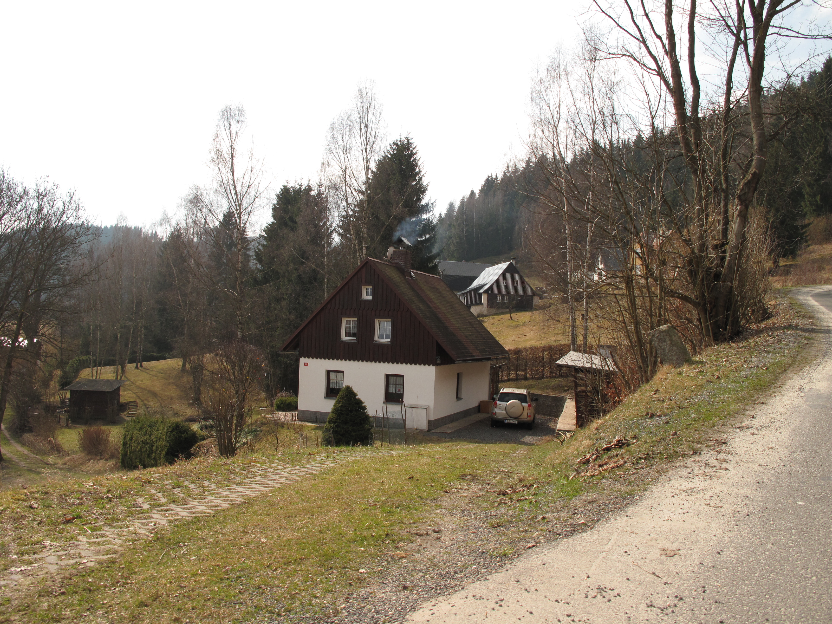 Dům ve Žďáře. Okres Jablonec nad Nisou, Česká republika.